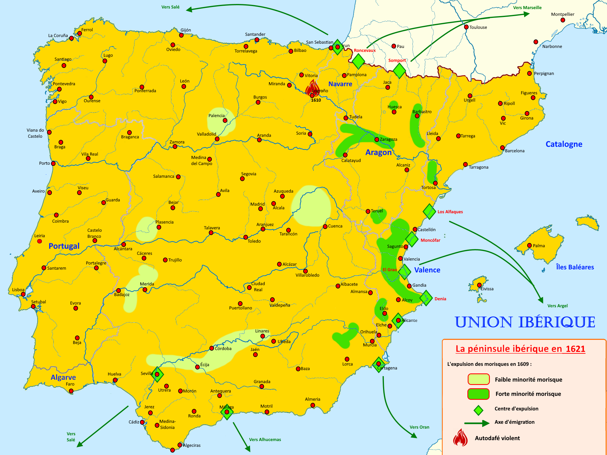 Carte de l'Union Ibérique sous le règne de Philippe III